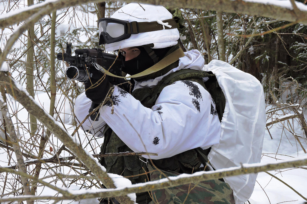 Будни военнослужащих РВСН в зимнем периоде обучения